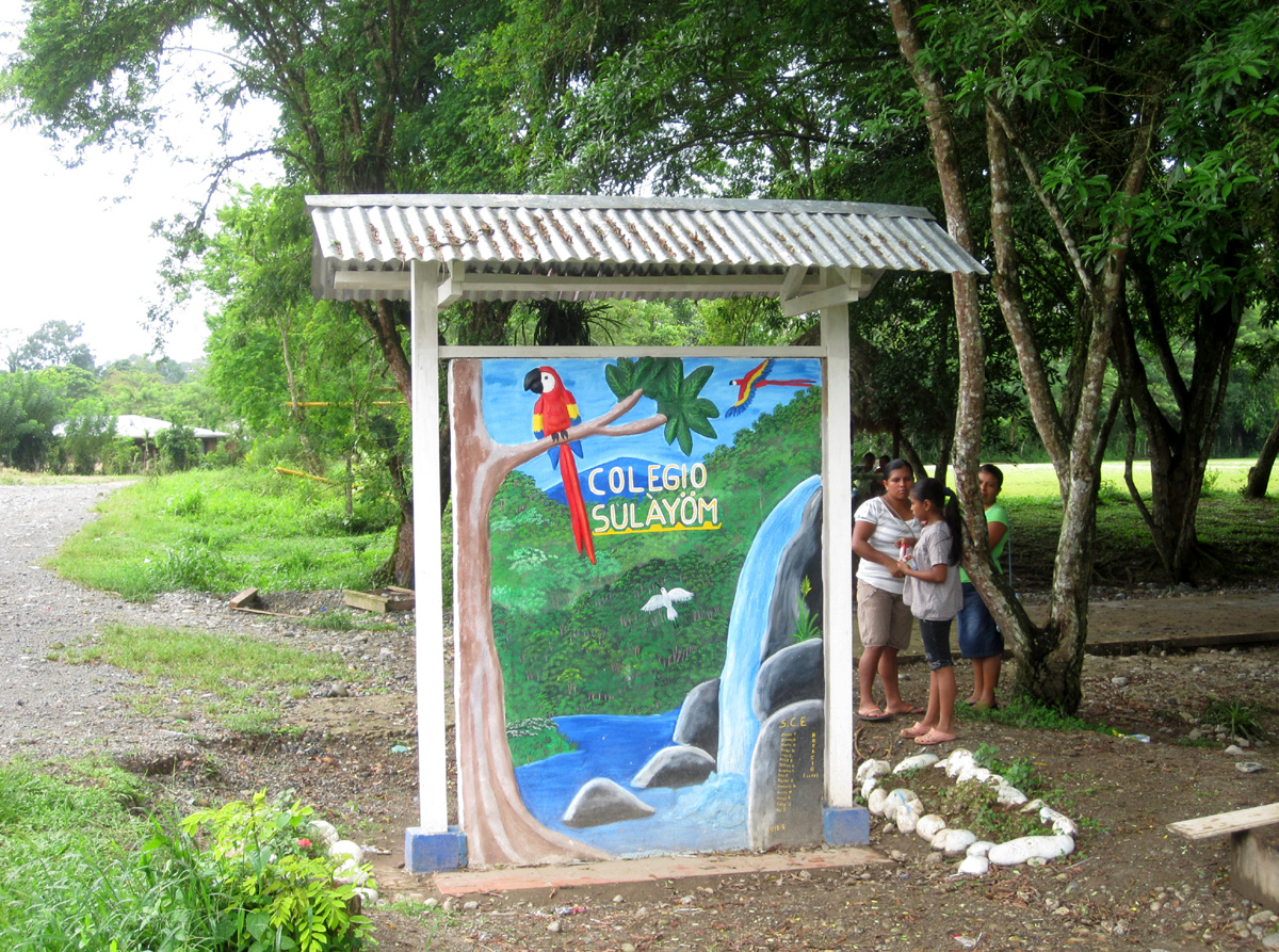 Sulàyöm skole i Amubre i bribri-reservatet i Talamanca i Costa Rica